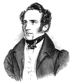 Karl August Devrient, deutscher Schauspieler (1797-1872)